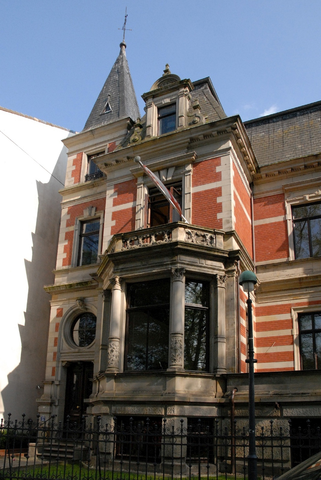 Villa Johann Smidt, Contrescarpe 32, ehem. Nr. 33 von Gildemeister & Sunkel